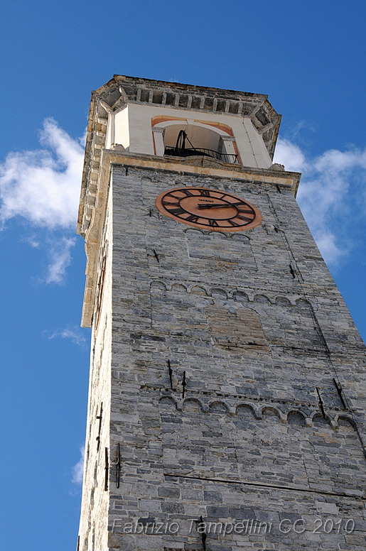 Santa Maria Maggiore